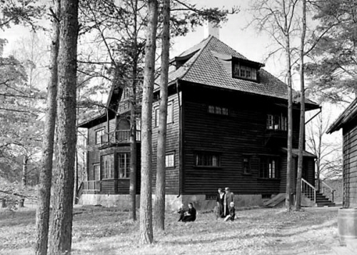 Mauritz Hellbergs Villa Skogsbrynet, på Hellbergsvägen i Marieberg i Karlstad. Byggnadsår 1903. Arkitekt Svante Dyhlén